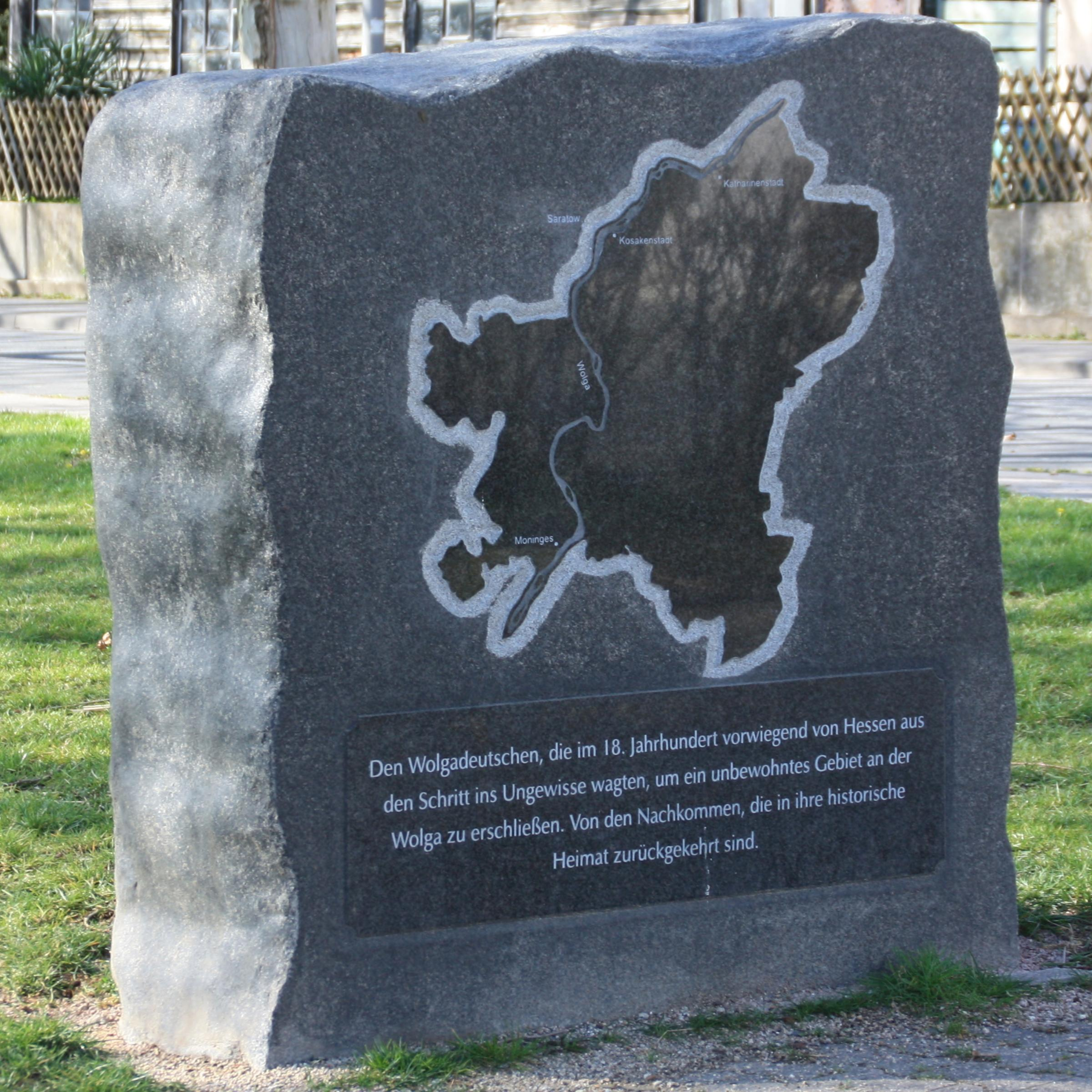 Denkmal zur Auswanderung der Wolgadeutschen im 18. Jahrhundert aus Hessen in Biebrich, Wiesbaden. Eingeweiht am 28. August 2011